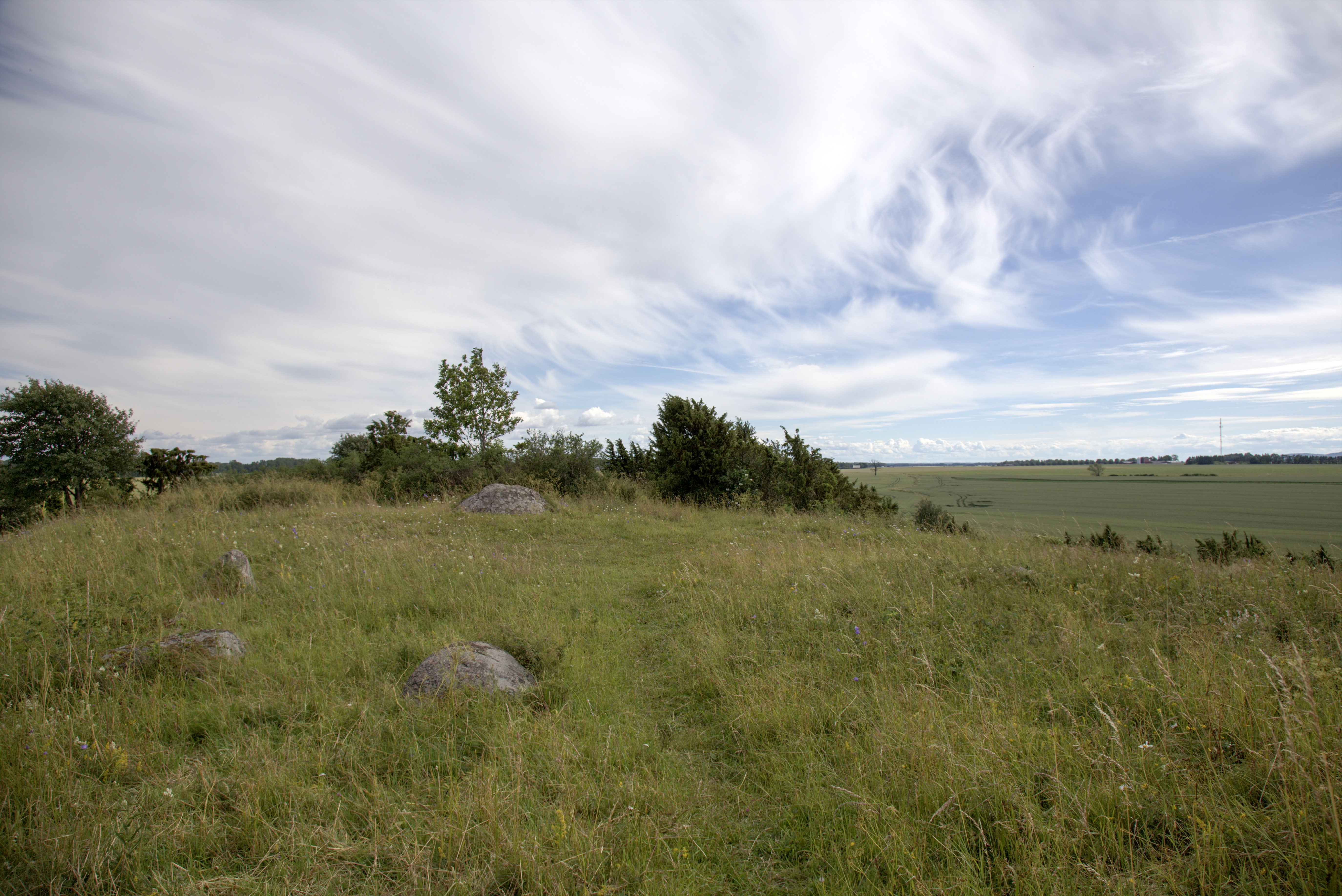 Dommarring på Kastad kulle.